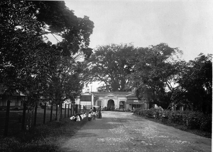 Foto. Militair hospitaal te Malang.